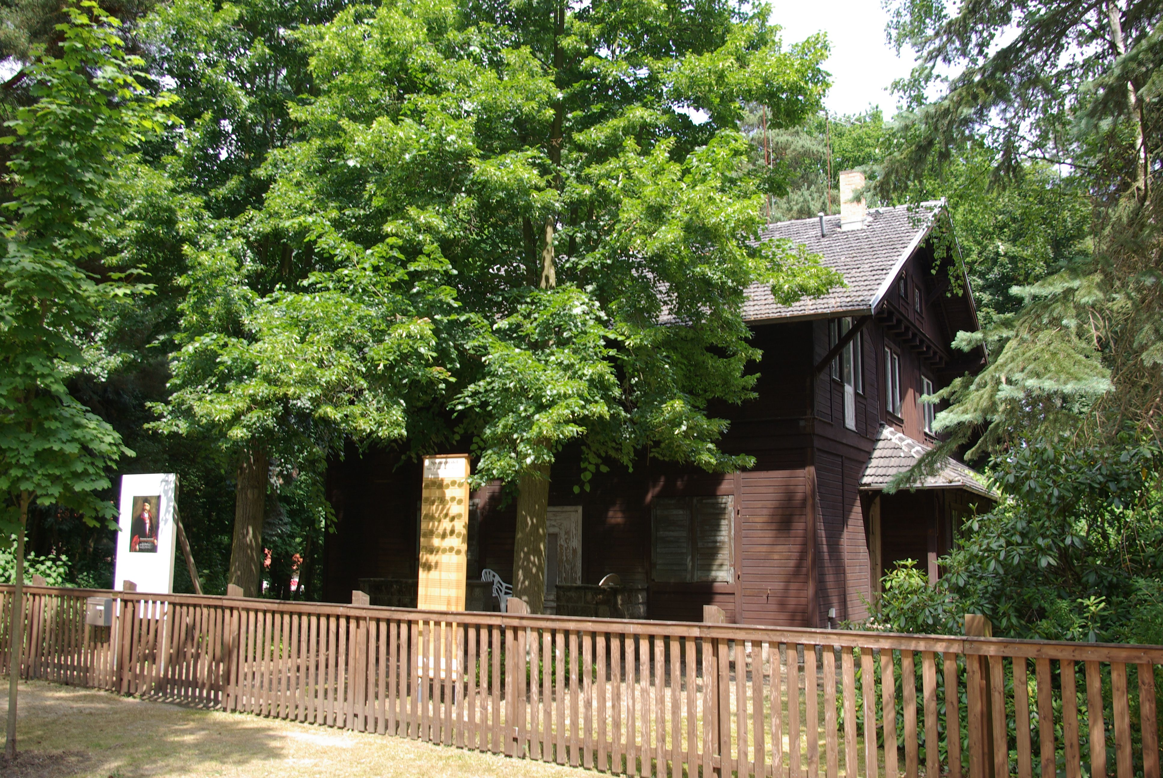 Bad Saarow in Brandenburg. In dem Haus wohnte der Komponist Xaver Scharwenka. Das Haus steht unter Denkmalschutz.